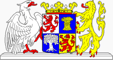 Gemeentewapen Opmeer